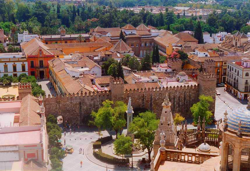 Reales Alcázares_UNIQadc9d5c403bee863-ref-00000006-QINU_